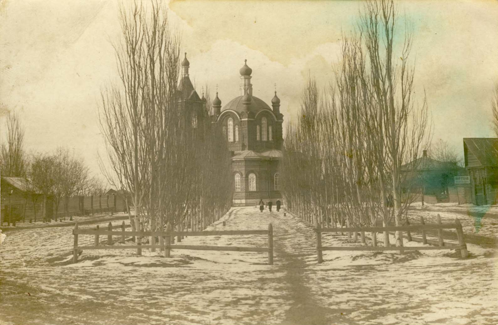 Покровская церковь в станице Константиновская